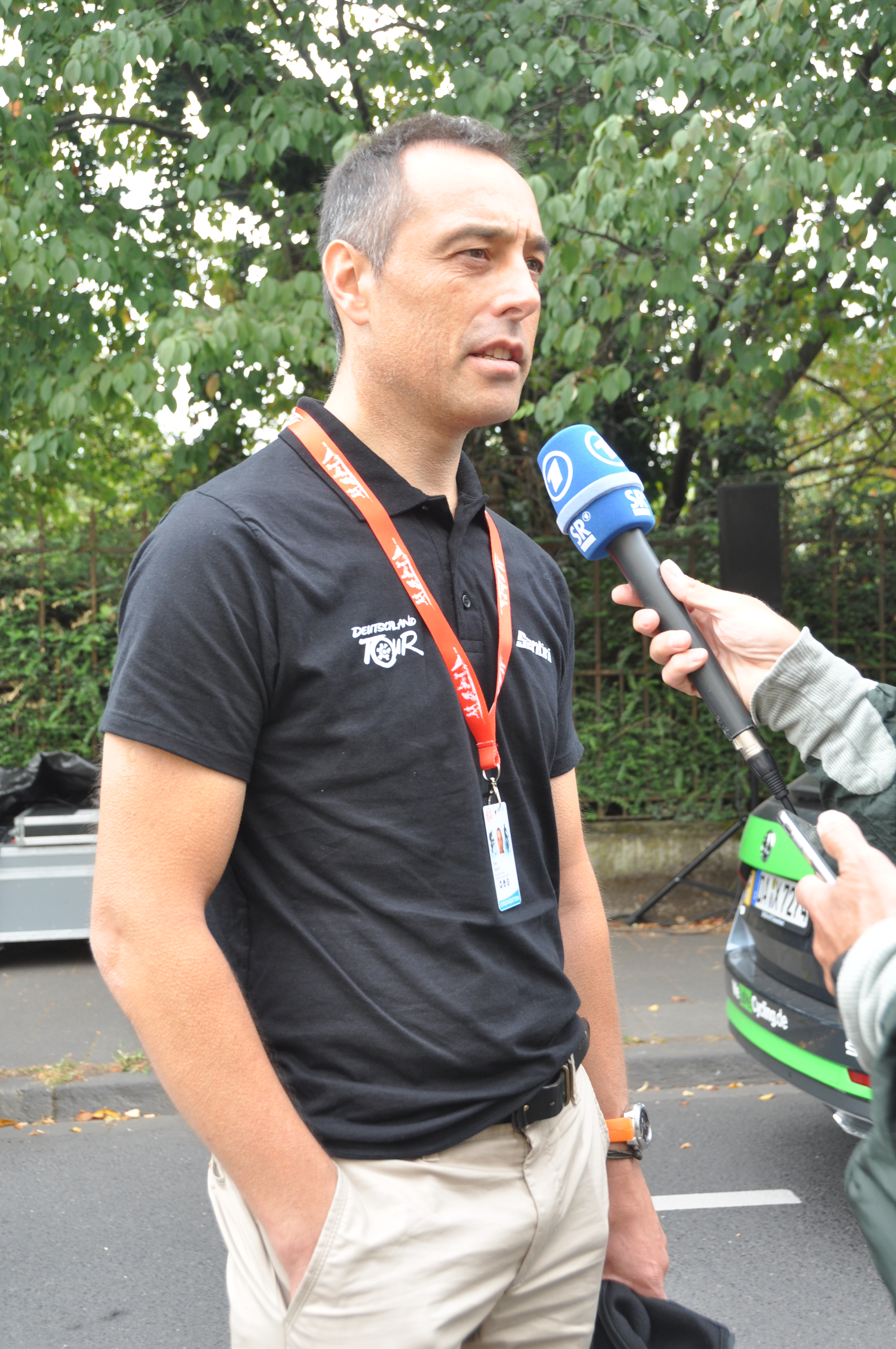 Jean-Michel Monin, Sportlicher Leiter der Deutschland Tour 2018, ehemaliger Radrennfahrer